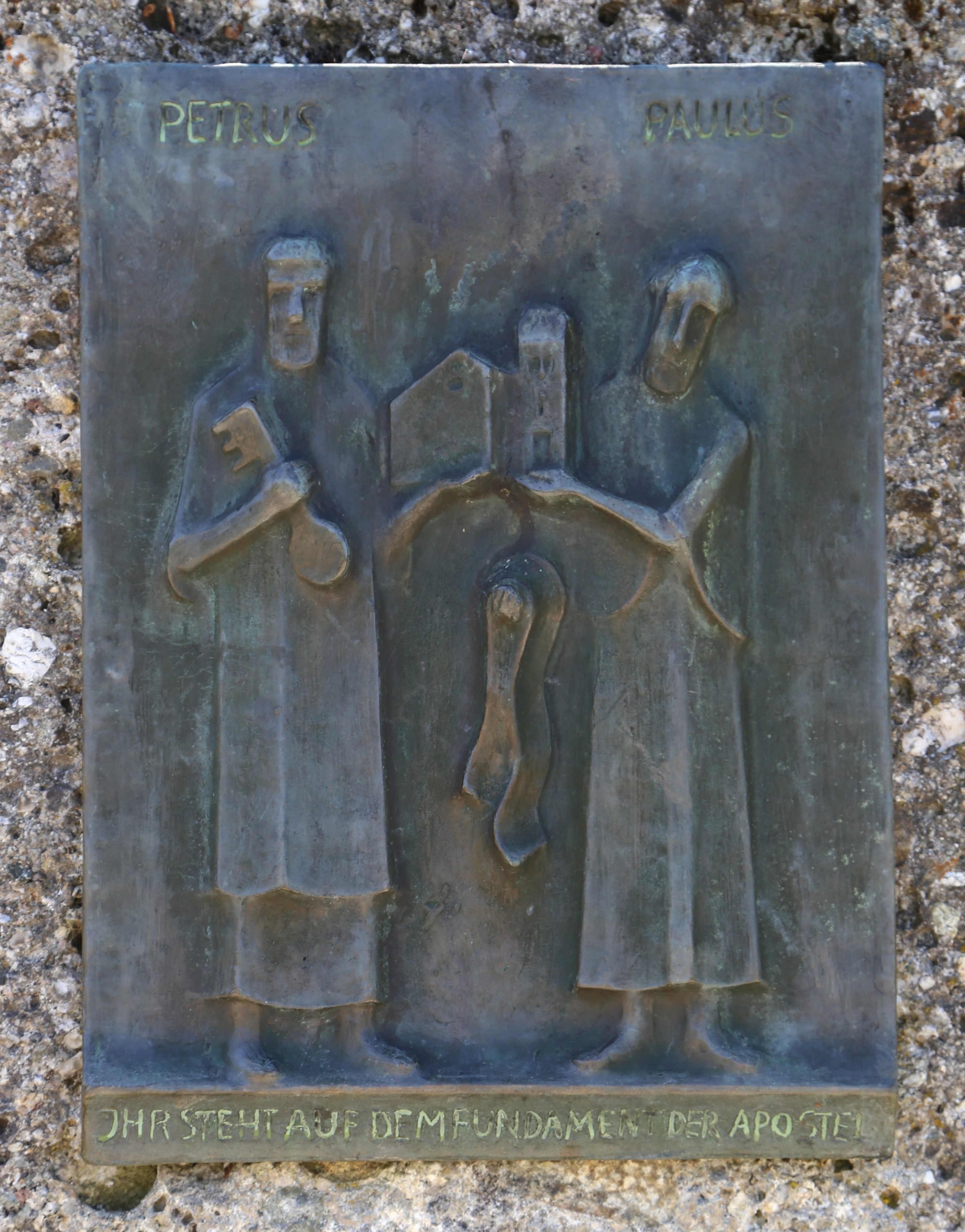 Apostelweg zum Petersberg, Flintsbach am Inn 1978 gestaltet von dem Bildhauer Josef Hamberger